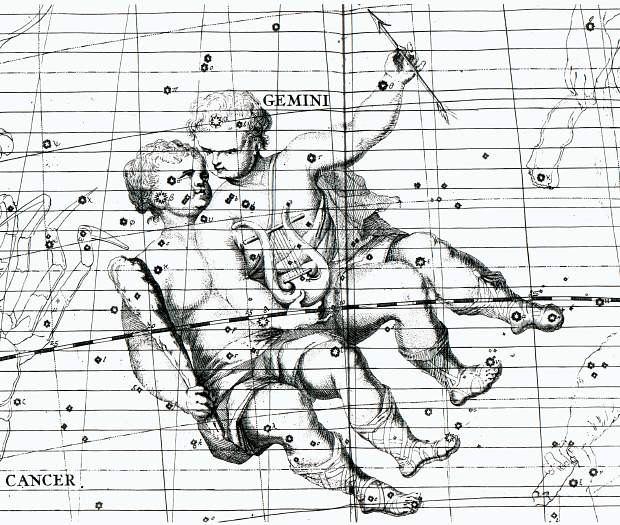 Gemelli